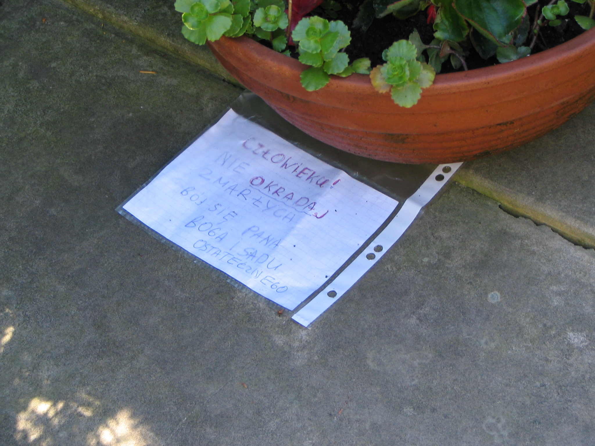 Apel właściciela grobu do "hieny cmentarnej", o nieokradanie grobu.